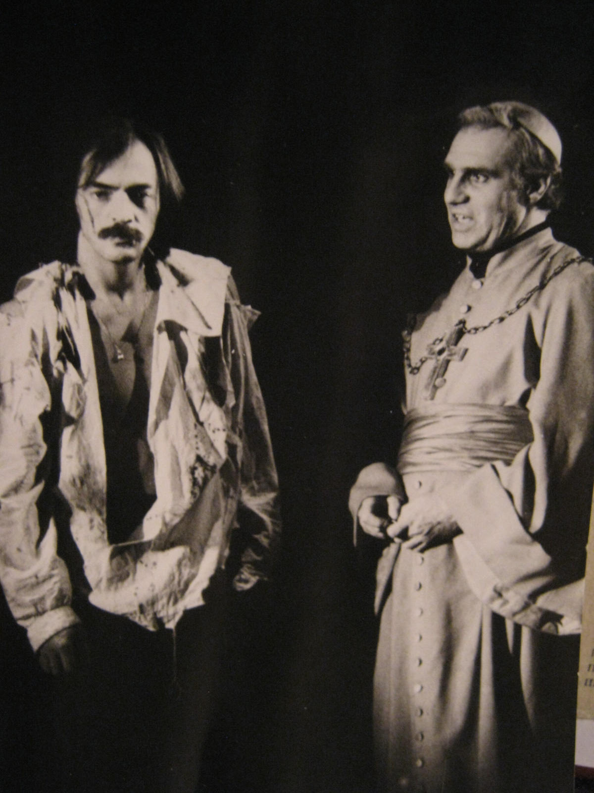 Сцена из спектакля «Овод» Ленинградского государственного театра им. Ленинского комсомола. В роли Ривареса Михаил Боярский, в роли Монтанелли Роман Громадский, режиссёр-постановщик Егоров Геннадий Семёнович